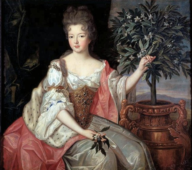 Françoise Marie de Bourbon (1677-1749), duchesse d'Orléanslabel QS:Lfr,"Françoise Marie de Bourbon (1677-1749), duchesse d'Orléans"